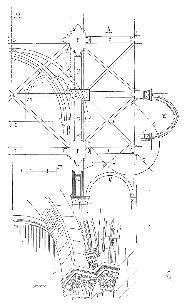 ... La cathédrale de Sens ne peut donc passer pour avoir servi de point de départ pour les travaux de Saint-Denis, et les voûtes de Saint-Étienne de Sens accusent une indécision (surtout les voûtes basses), des tâtonnements qui n'apparaissent plus à Saint-Denis. Examinons (fig. 23) une demi-travée de la nef de la cathédrale de Sens. Les voûtes des collatéraux A possèdent des arcs-doubleaux C qui sont plein cintre (voy. le rabattement C'). Mais les travées de la nef étant doubles, c'est-à-dire alternativement composées de grosses piles P pour porter les arcs-doubleaux et les arcs ogives des hautes voûtes, et de piles intermédiaires S composées de colonnes accouplées destinées à porter seulement les arcs de recoupement de ces voûtes hautes, les arcs ogives des voûtes basses se placent assez gauchement sur ces piles ...